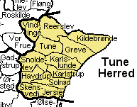 Tune Herred Roskilde Amt , Denmark. Map by Svend-Erik Christiansen, edited by user:Nico-dk .